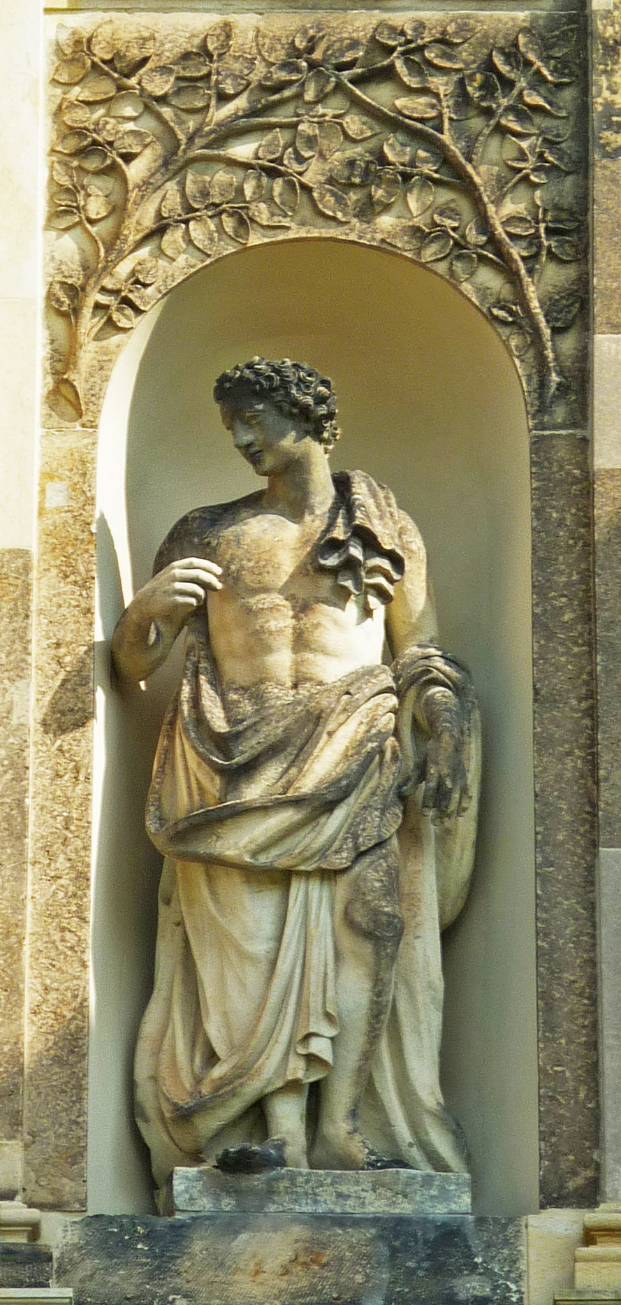 Mythologische Figur am Palais im Großen Garten in Dresden